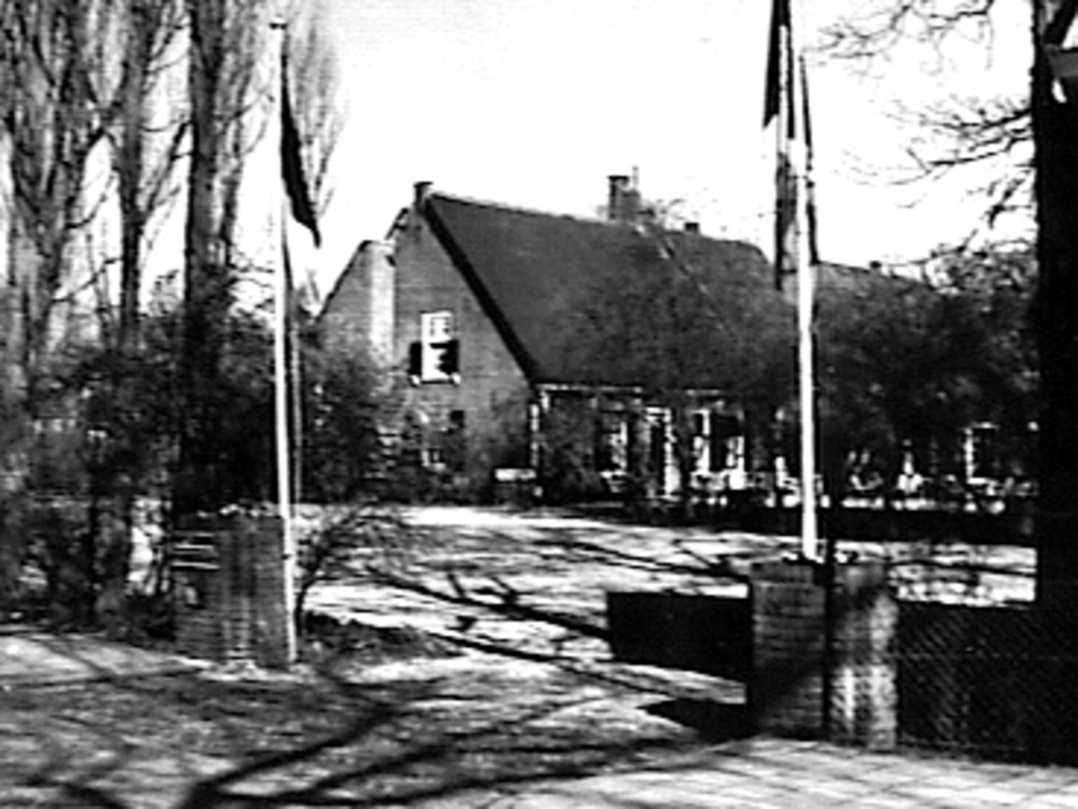 Meerrust: voor- en zijgevel nr. KA 8 (opmerking: Deze afbeelding hebben wij helaas alleen in deze lage resolutie.)